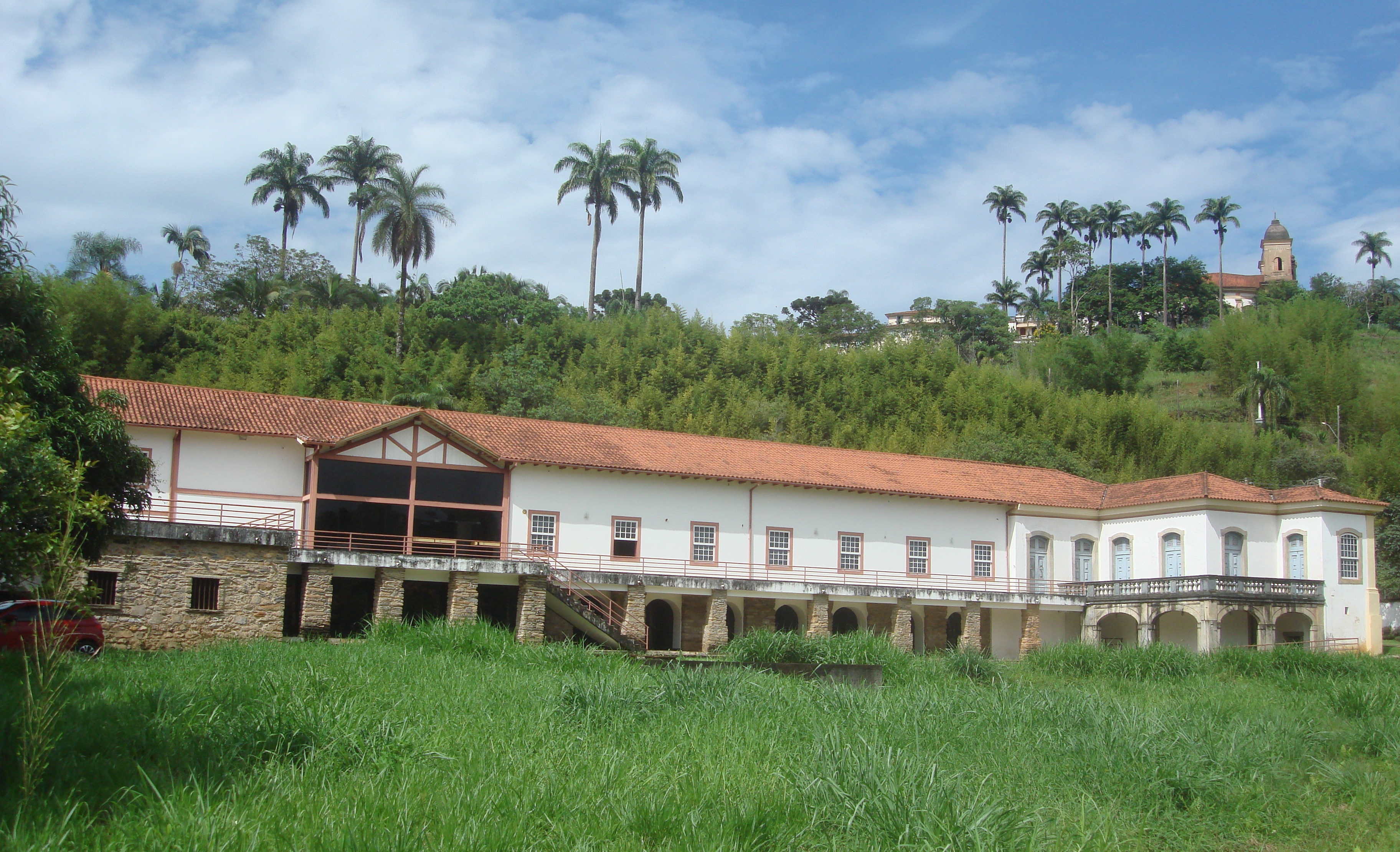 Palácio da Olaria (Palácio dos Bispos) de Mariana (MG), atual Museu da Música de Mariana